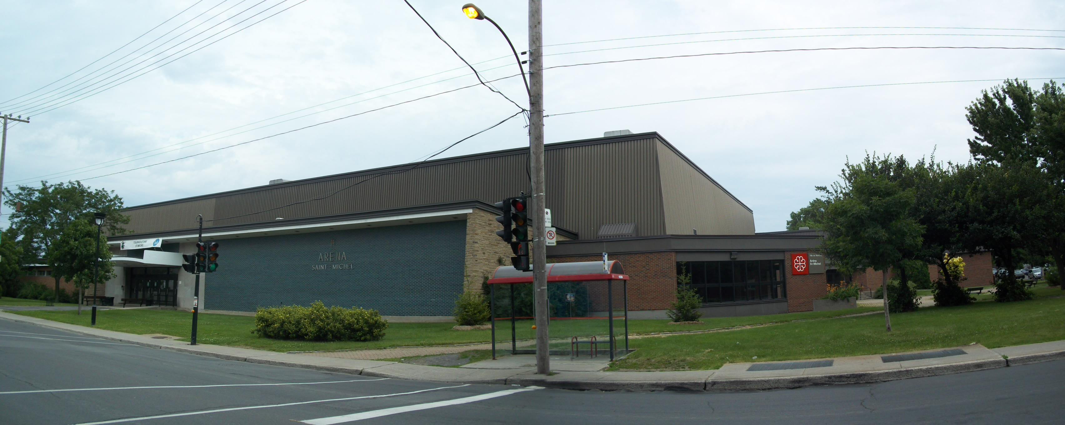 Arena Saint-Michel, Montréal